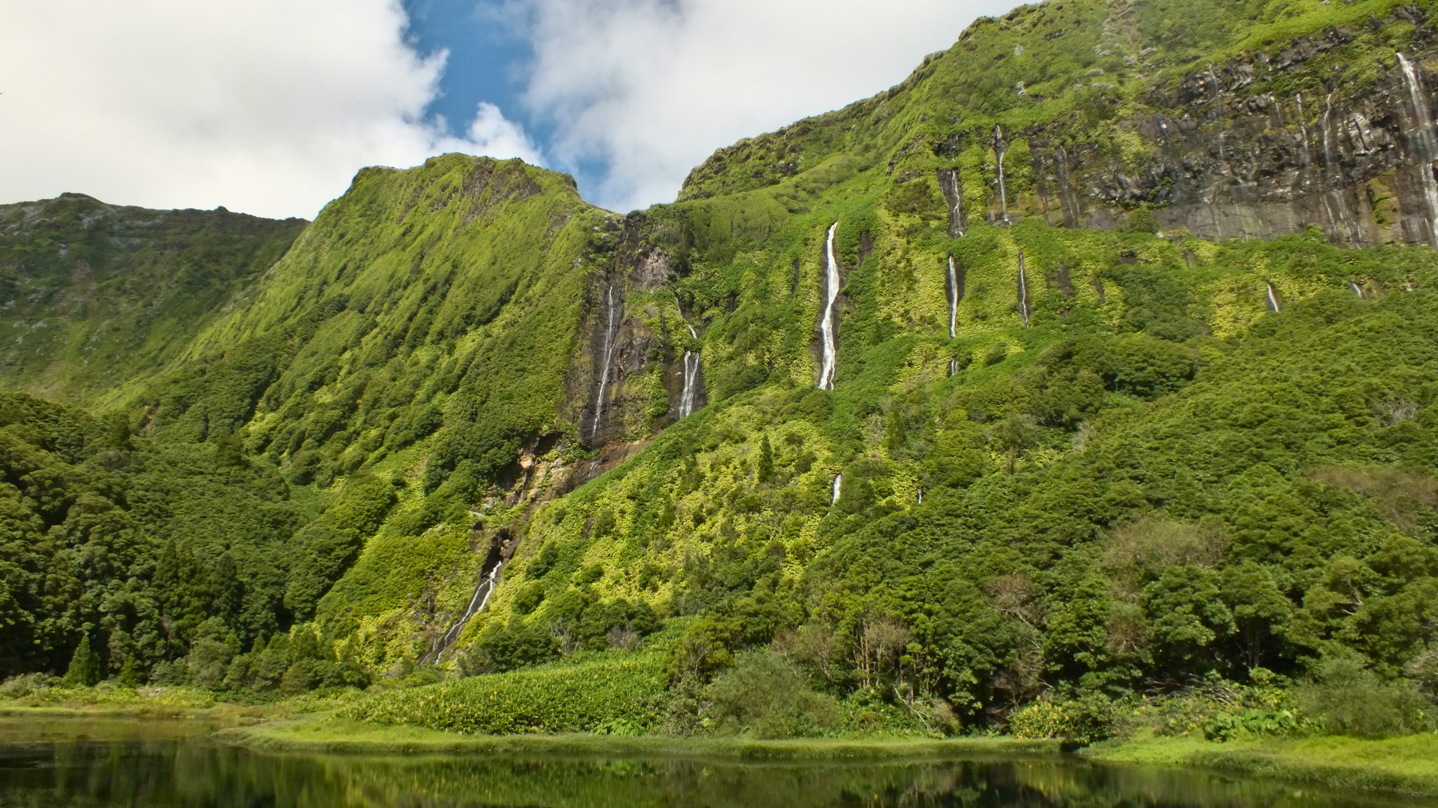 Ribeira Grande falls, Flores Island, Azores